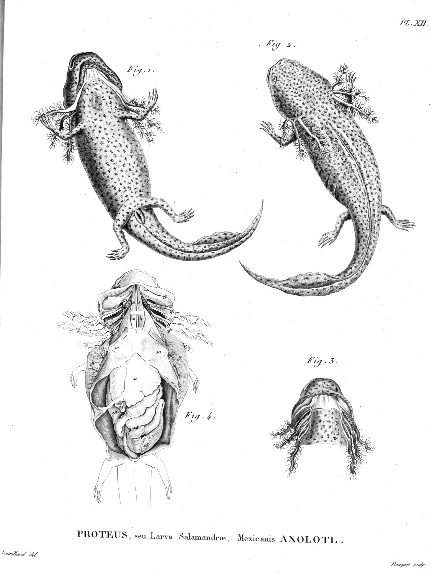 Anatomie des Axolotl Ambystoma mexicanum. Der Axolotl und ein Theil der Anatomie desselben. Fig. 1. Der Axolotl von unten. Fig. 2. Derselbe von oben angesehn. Fig. 3. Der Kopf und Hals des Axolotl. Die fleischichten Kiemendeckel sind zurückgeschlagen und die Kiemenboegen von einander entfernt, damit man die Kiemenoeffnungen, die Verzaehnung derselben und die Verbindung der Kiemen mit ihren Boegen sehen koenne. Fig. 4. Der Axolotl geoeffnet. 1 1. Die Gaumen- und Zungenbeinmuskeln. 2 2. die den Zungen- und Brustbeinmuskeln entsprechenden Muskeln. 3 3. Die Muskeln, welche die ersten Kiemenboegen nach vorn ziehen. 4 4. Die Muskeln, welche dieselben nach hinten ziehen. 6 6 6 Die Kiemenboegen. 7 7 7. Die Kiemen. 8 8. Die zurückgeschlagenen haeutigen und fleischichten Kiemendeckeln. 9 9. Die seitwaerts zurückgelegte Haut. 10 10. Die Brustmuskeln in ihrer Lage. 11. Die Leber. 12. Die Gallenblase. 13. Der Magen. 14 14. Verschiedene Theile des Darmkanals, wo man noch einen ganzen Krebs sieht. 16. Das Ende der Lungen.